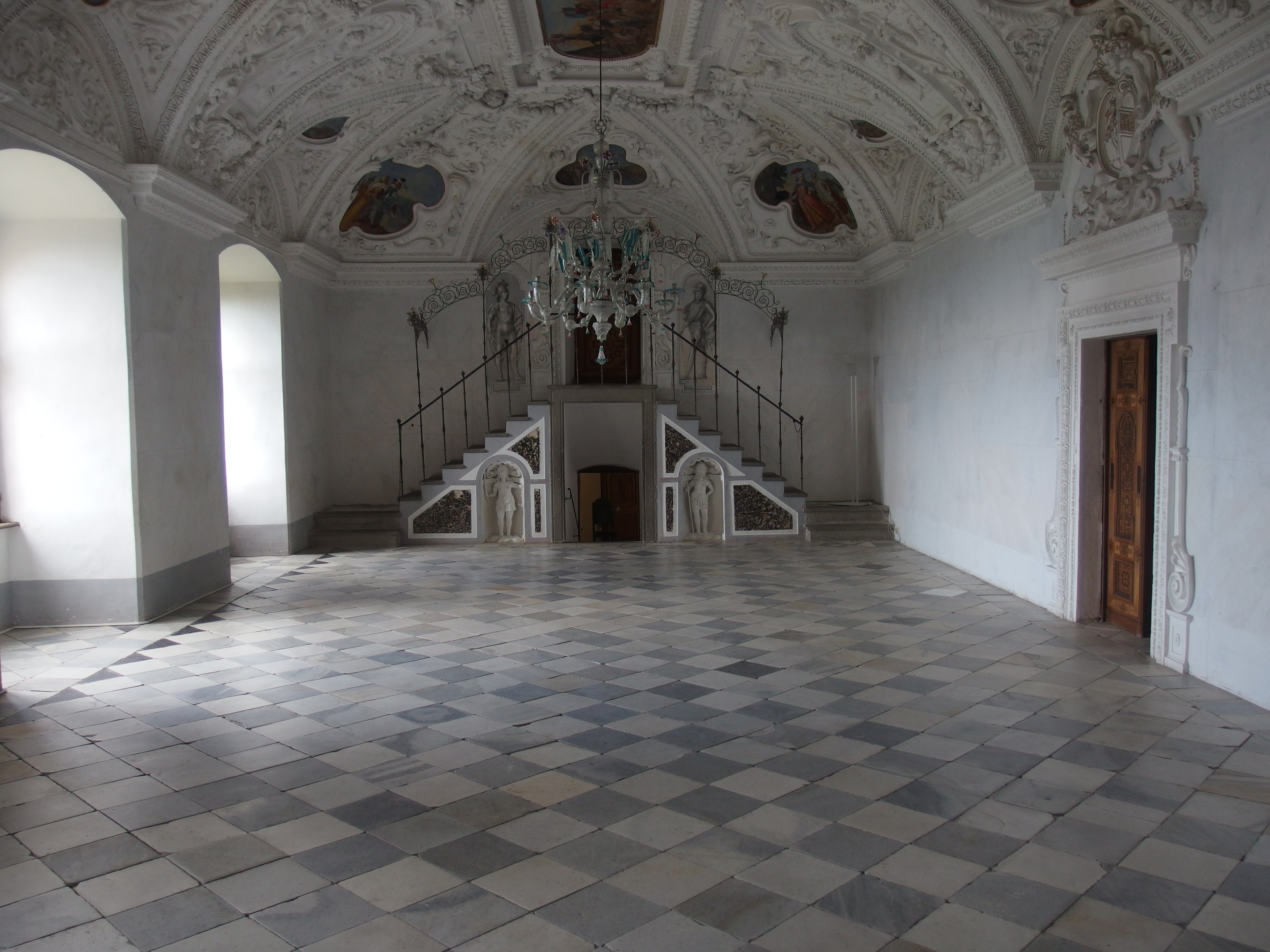 Der "Weiße Saal" in der Riegersburg (Steiermark)